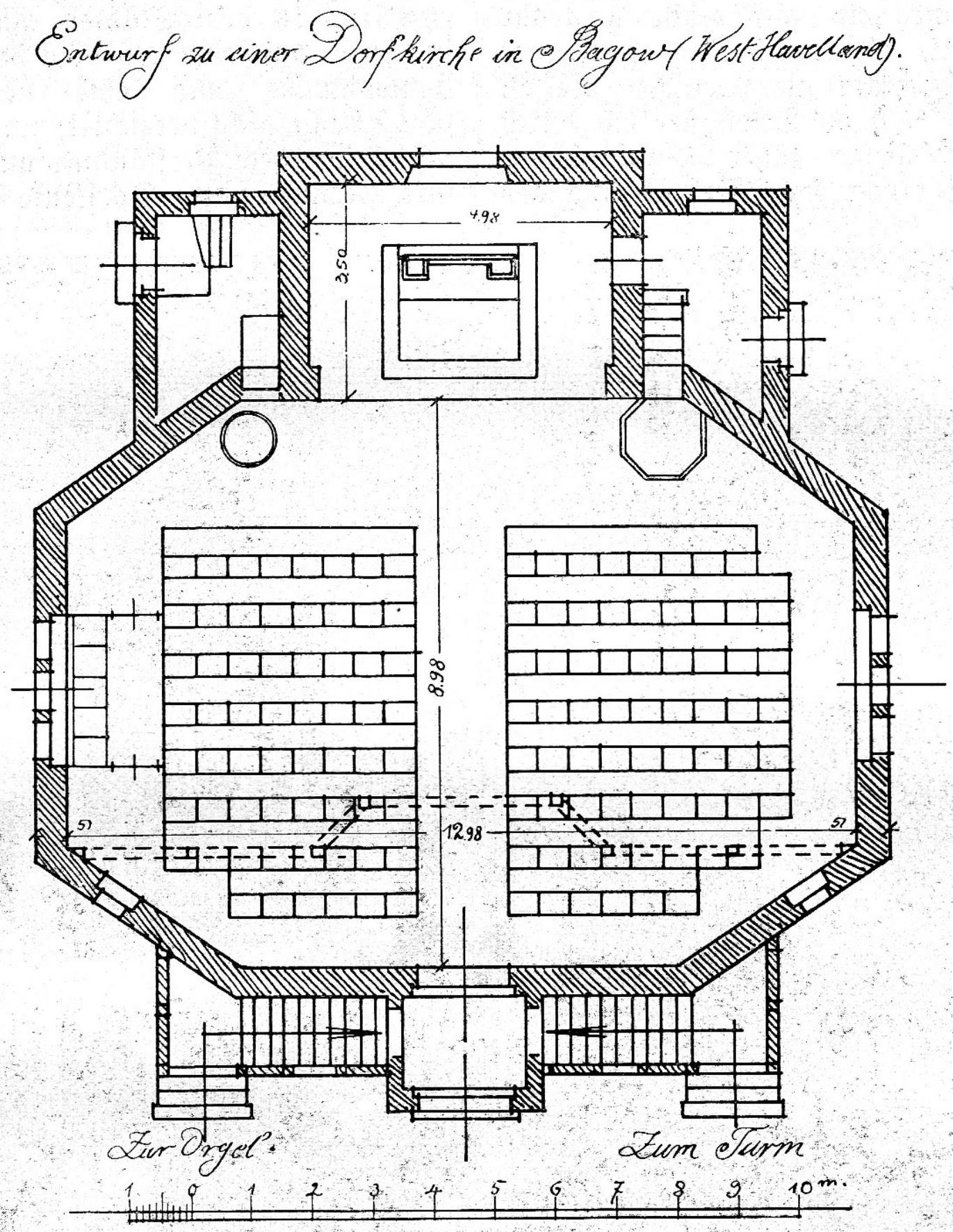 Grundriss Dorfkirche Bagow, Georg Büttner: Die neue Dorfkirche in Bagow (West-Havelland). In: Die Dorfkirche, 1. Jahrgang 1907/1908, S. 35.